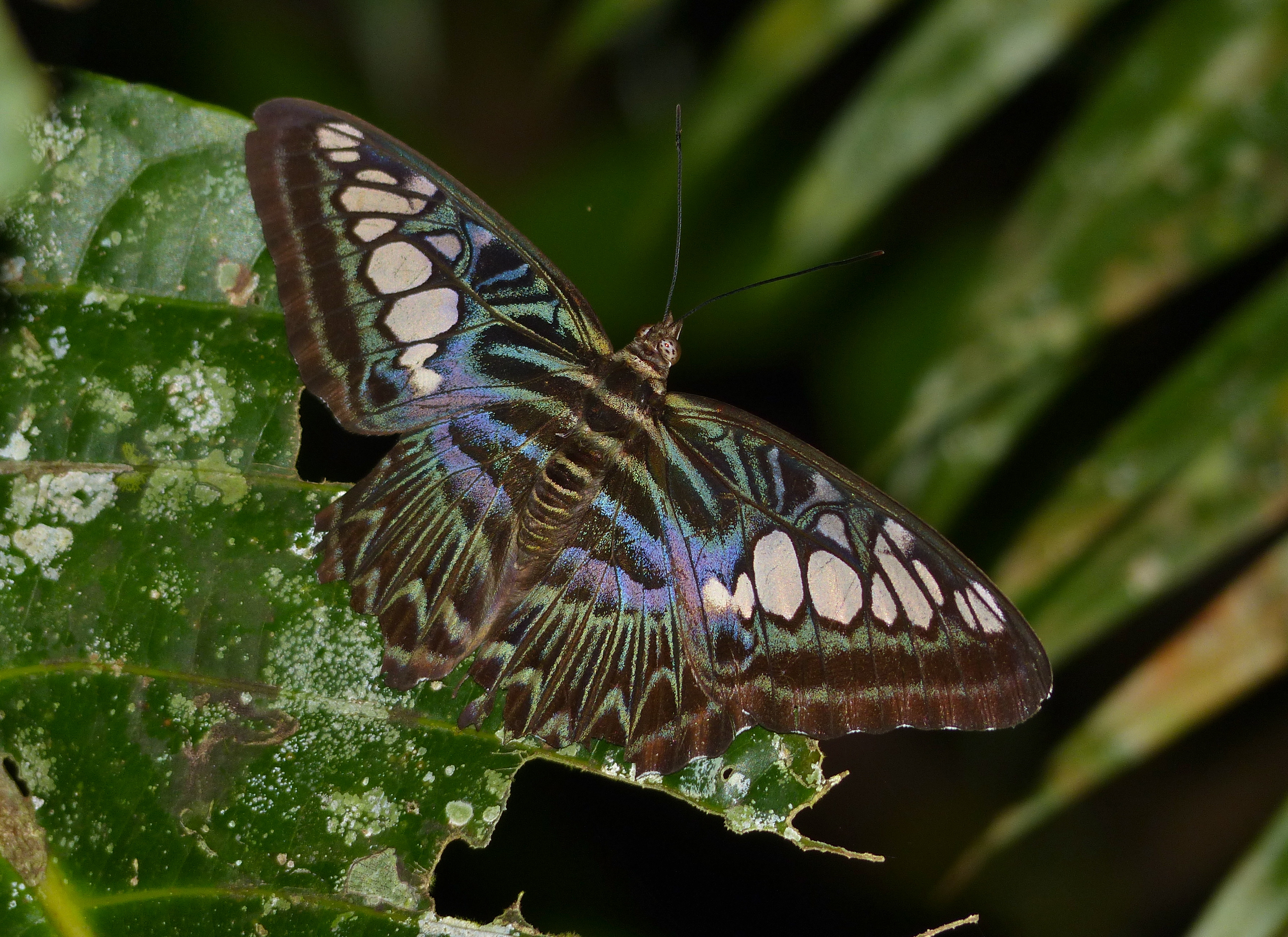 Niah NP, Sarawak, MALAYSIA